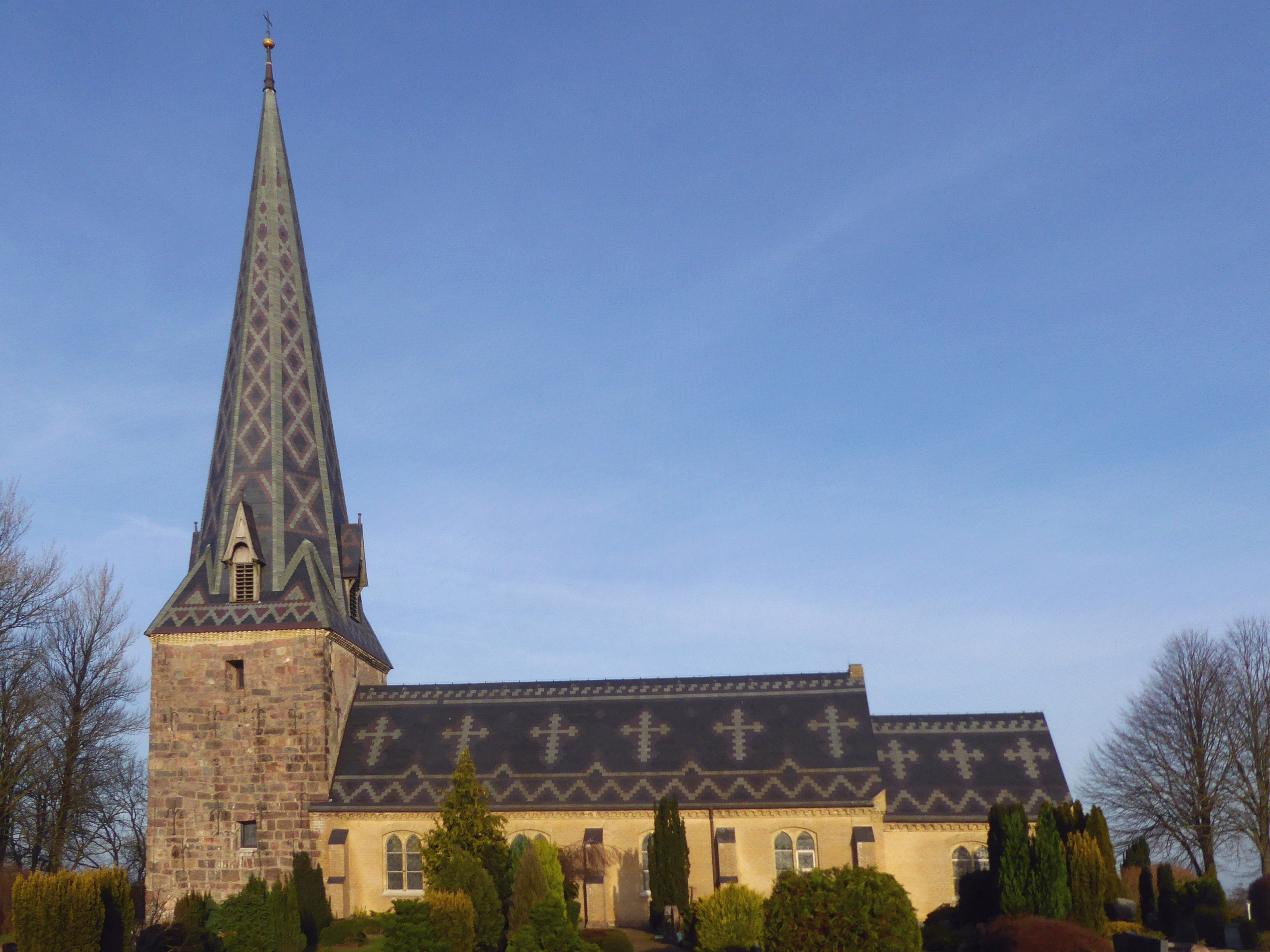 Kirche von Handewitt in Schleswig-Holstein nahe Flensburg. Als Ursprung wird auf das 13. Jahrhundert verwiesen: zur Wiesharde gehörend. Die Turmmauern zählen zum Ursprung, das Kirchenschiff datiert jünger aus 1884. Foto Wolfgang Pehlemann P1350596